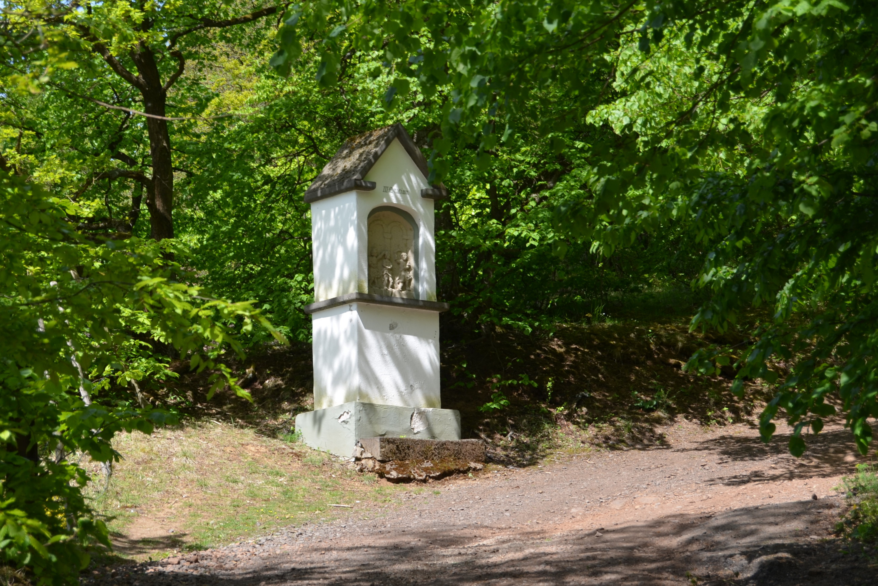 Kruiswegstatie